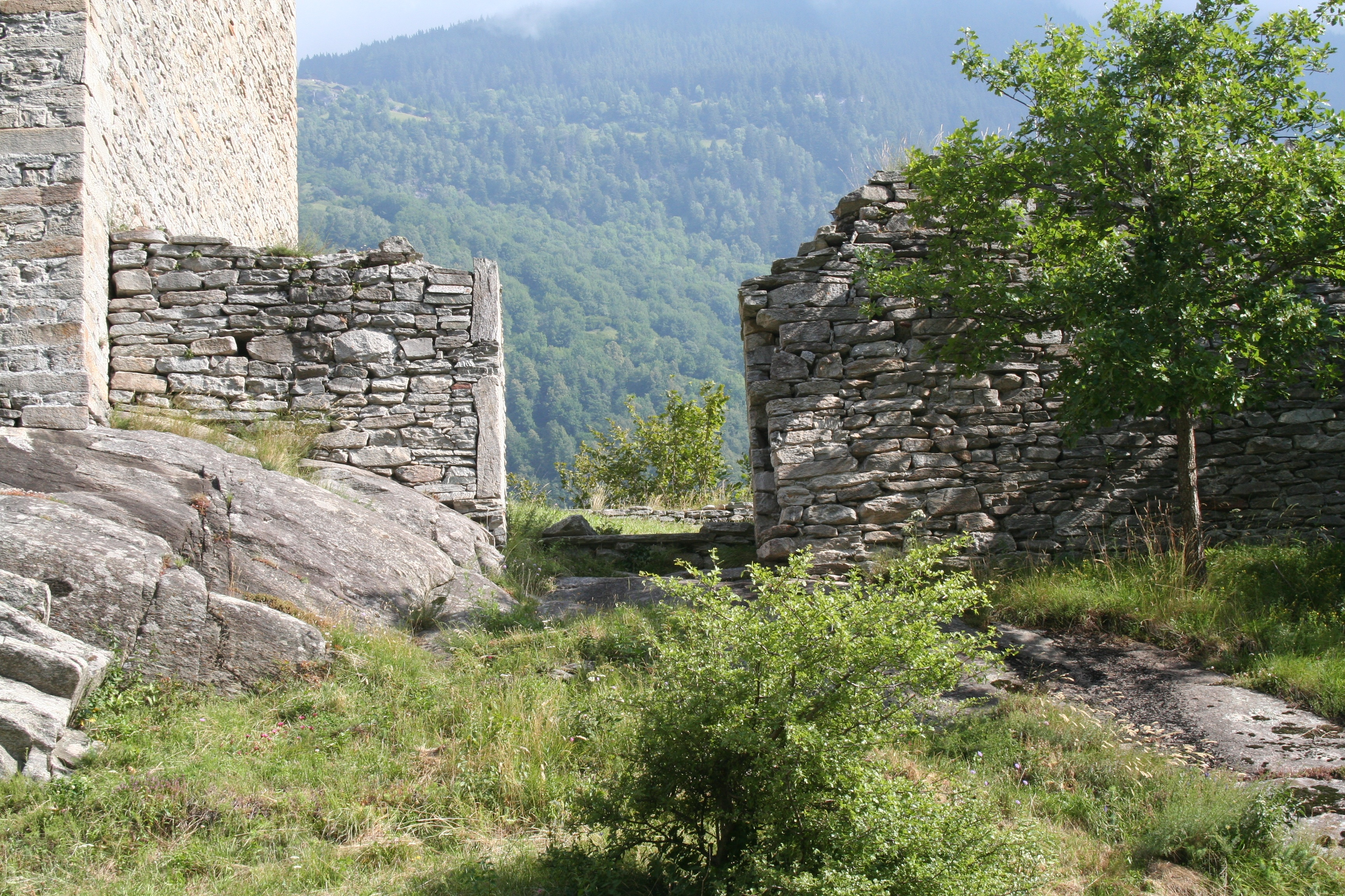 Castelmur: Tor